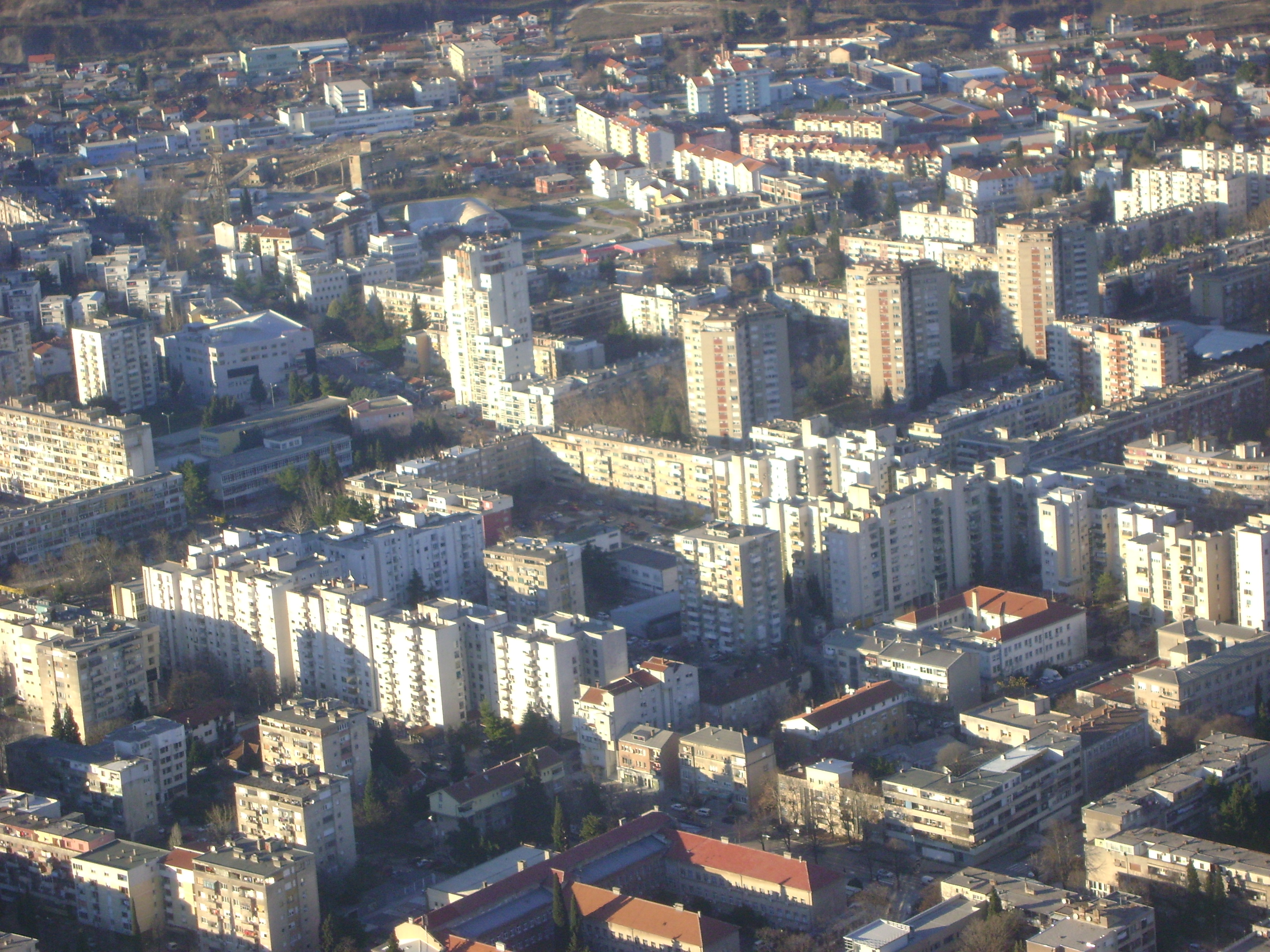 Moderne Stadtteile von Mostar